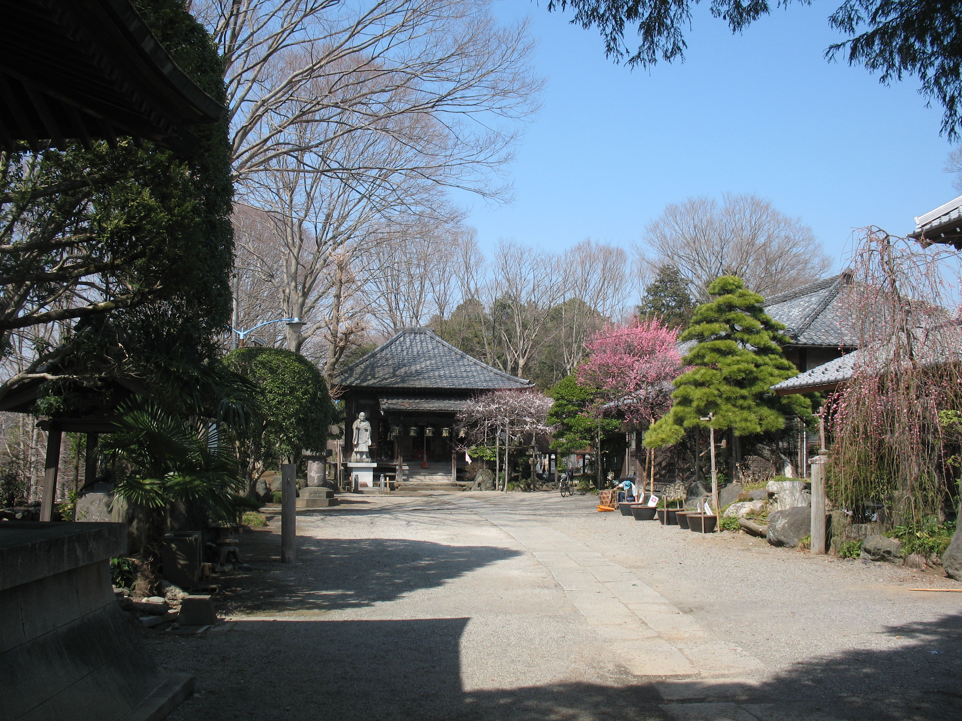 飯能市観音寺境内